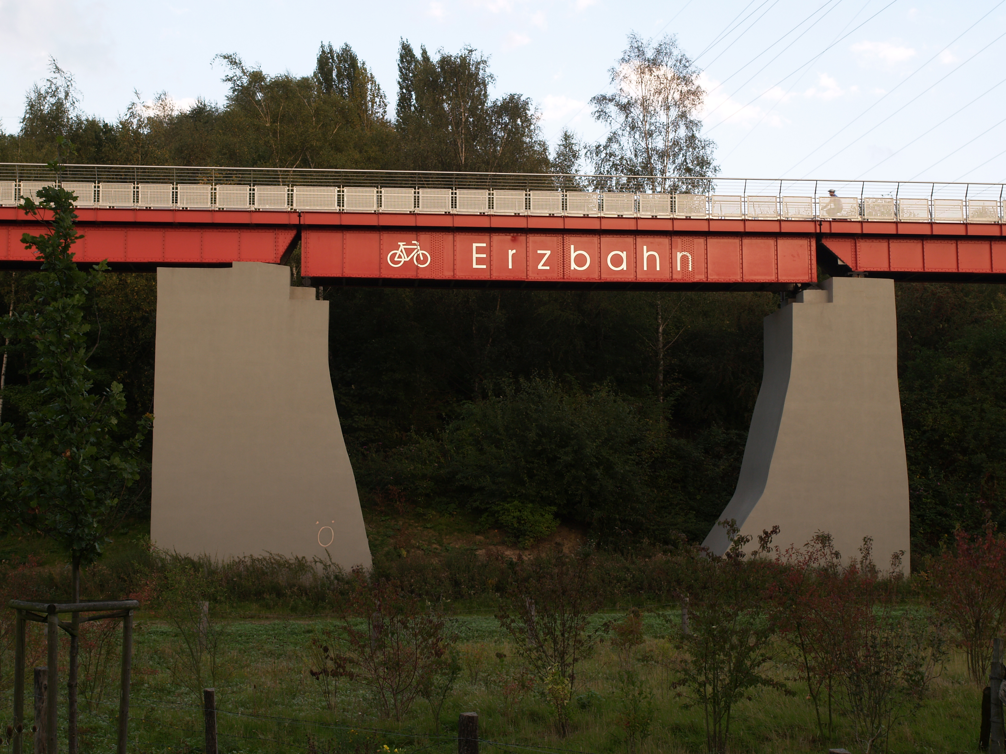 Brücke an der ehemaligen Erzbahn in Bochum das Mittelteil der Pfeilerbrücke